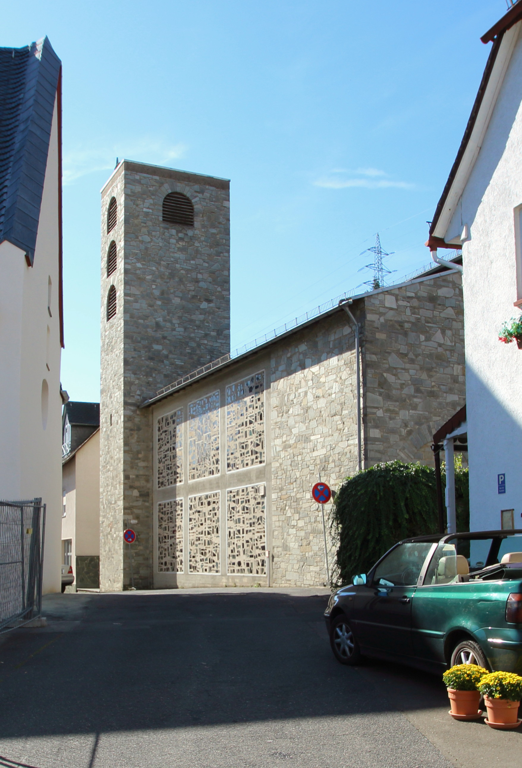 Die 1963 nach Plänen des Architekten Paul Johannbroer erbaute Kirche St. Martin war bis 2017 kath. Pfarrkirche von Martinsthal im Rheingau.